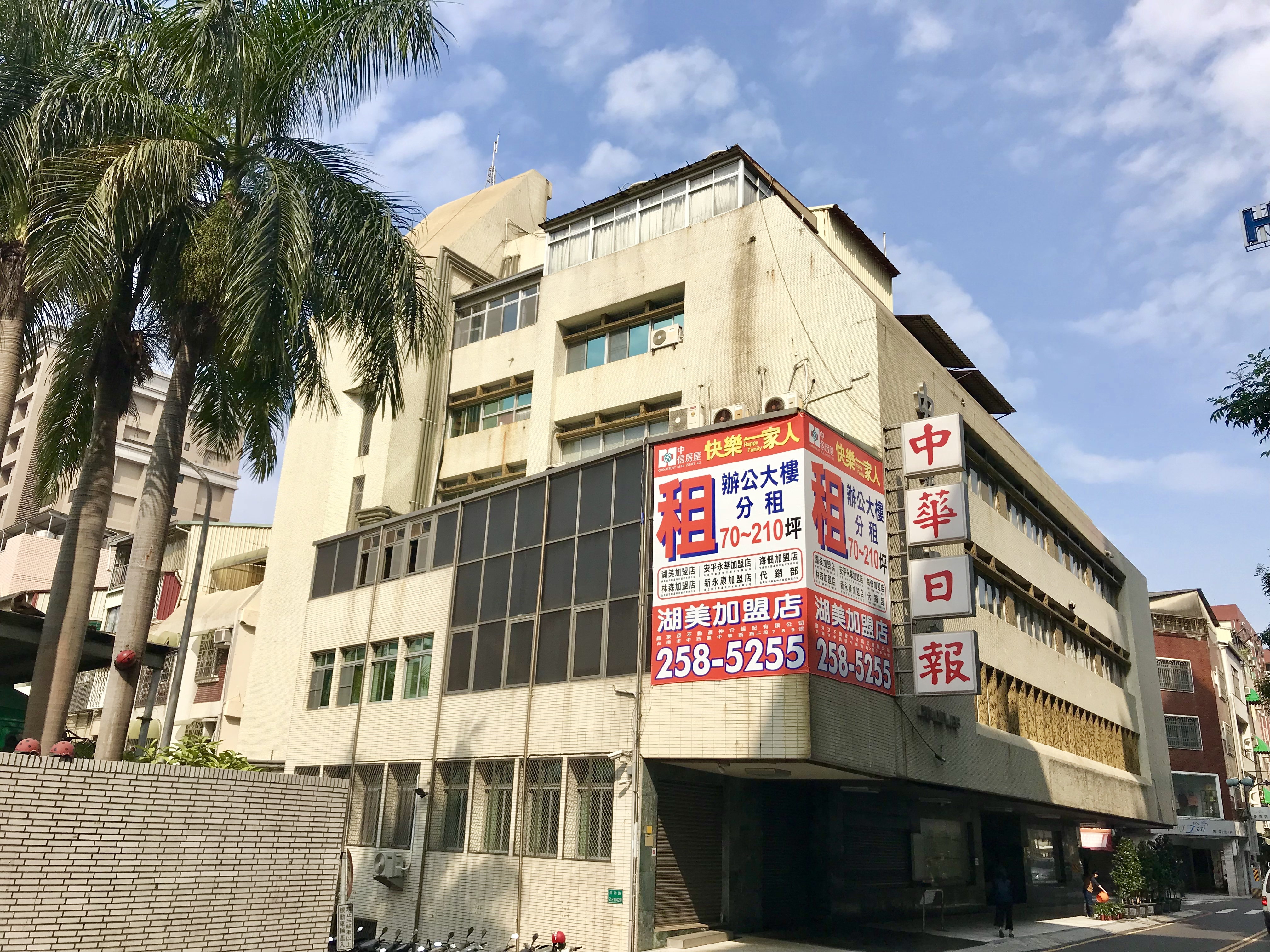 中華日報大樓